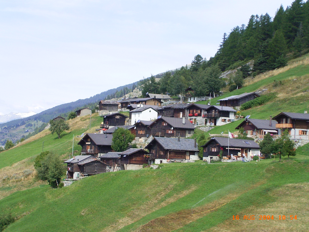 Tatz em 16/08/2004 - Isack